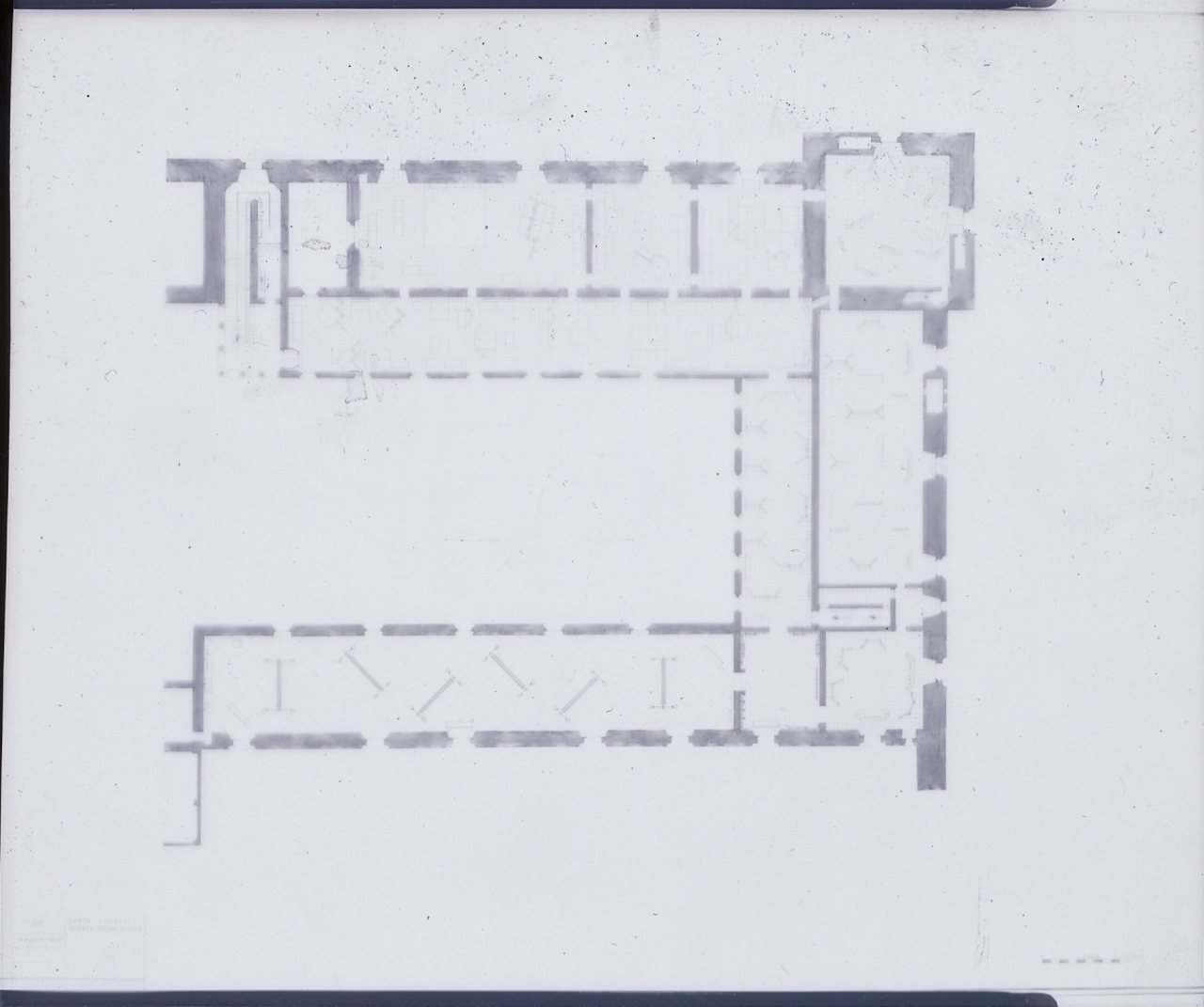 Servizio fotografico : Milano, 1956 / Paolo Monti. - Buste: 2, Fototipi: 2 : Negativo b/n, gelatina bromuro d'argento/ pellicola ; 10x12. - ((Serie costituita da 2 buste sciolte di negativi identificati con una doppia numerazione: 587 (264), 588 (265). - La seconda numerazione, manoscritta a matita vicino al numero identificativo del negativo, fa riferimento ad una numerazione interna alla serie "Musei - Castello". - Occasione: Documentazione del riordino e sistemazione dei Musei del Castello e per la pubblicazione: Belgiojso L., Peressutti E., Rogers E.N., "Il riordino dei Musei del Castello Sforzesco di Milano", in "Casabella", n. 211, 1956. - Fonte: Rubrica di Paolo Monti: Archivio 10x12 (ultimi numerati) - dal G1 al (s.d.), presso Archivio Paolo Monti. - Fonte: Monografia di Belgiojoso L. Peressutti E., Rogers E.N.: Il riordino dei Musei del Castello Sforzesco di Milano, in Casabella, n. 211 (1956)